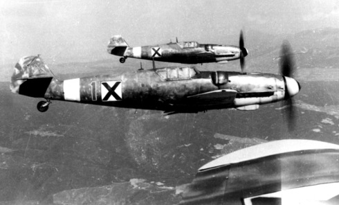 Самолета Месершмит Bf 109 G-6 с борден номер на командир поручик Петър Манолев.